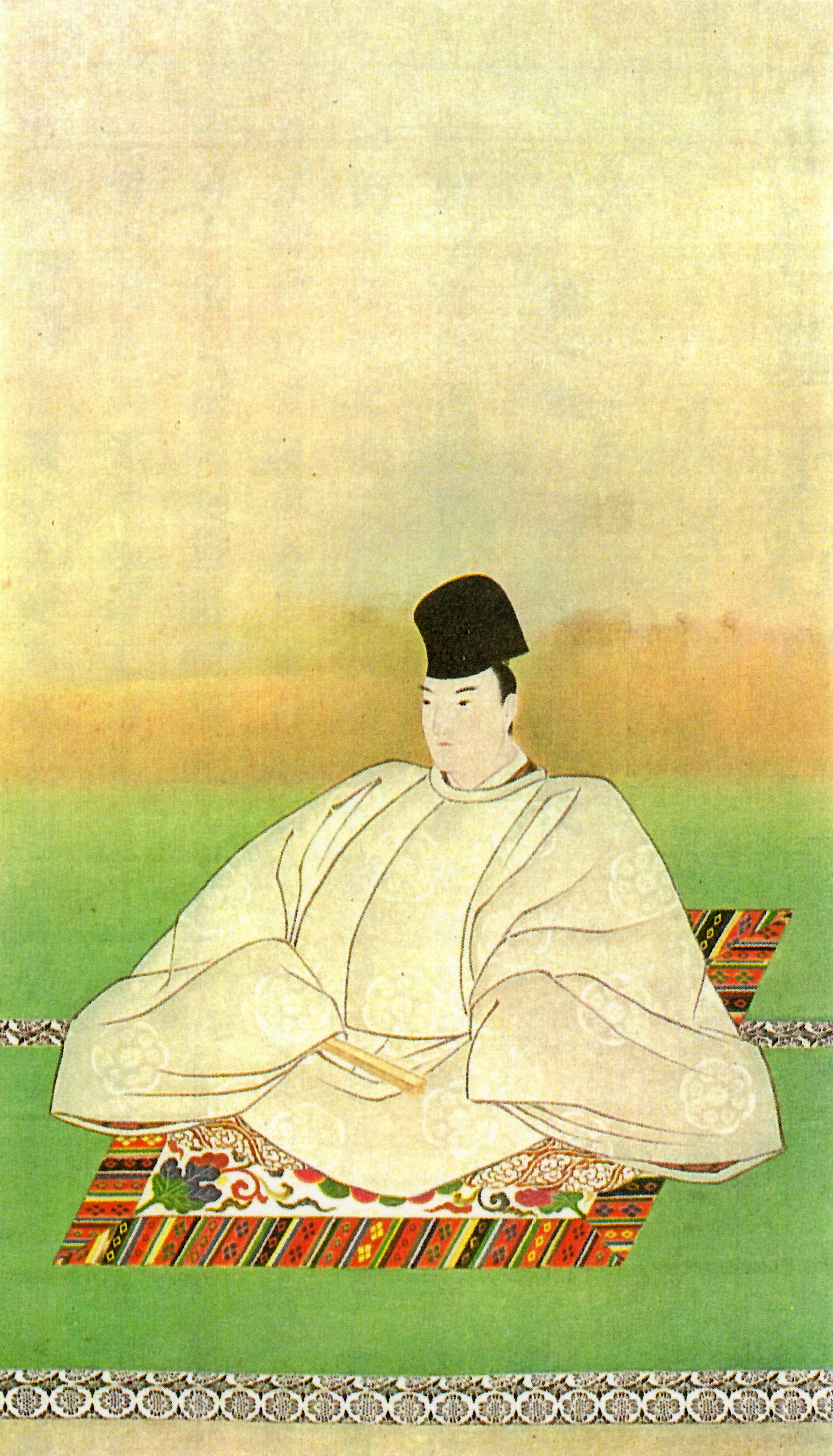 有栖川宮正仁親王の肖像。